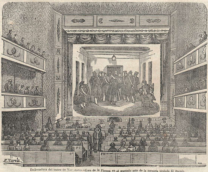 Embocadura del Teatro Variedades de Madrid, grabado publicado en la revista española La Ilustración.